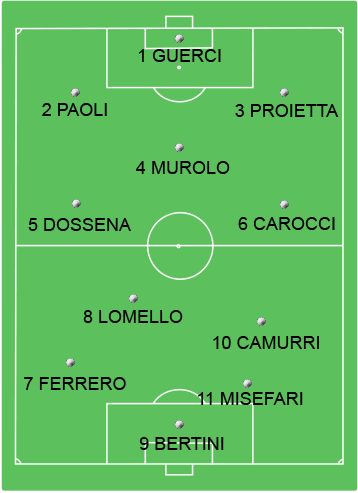 Formazione della Reggina datata 11 gennaio 1931